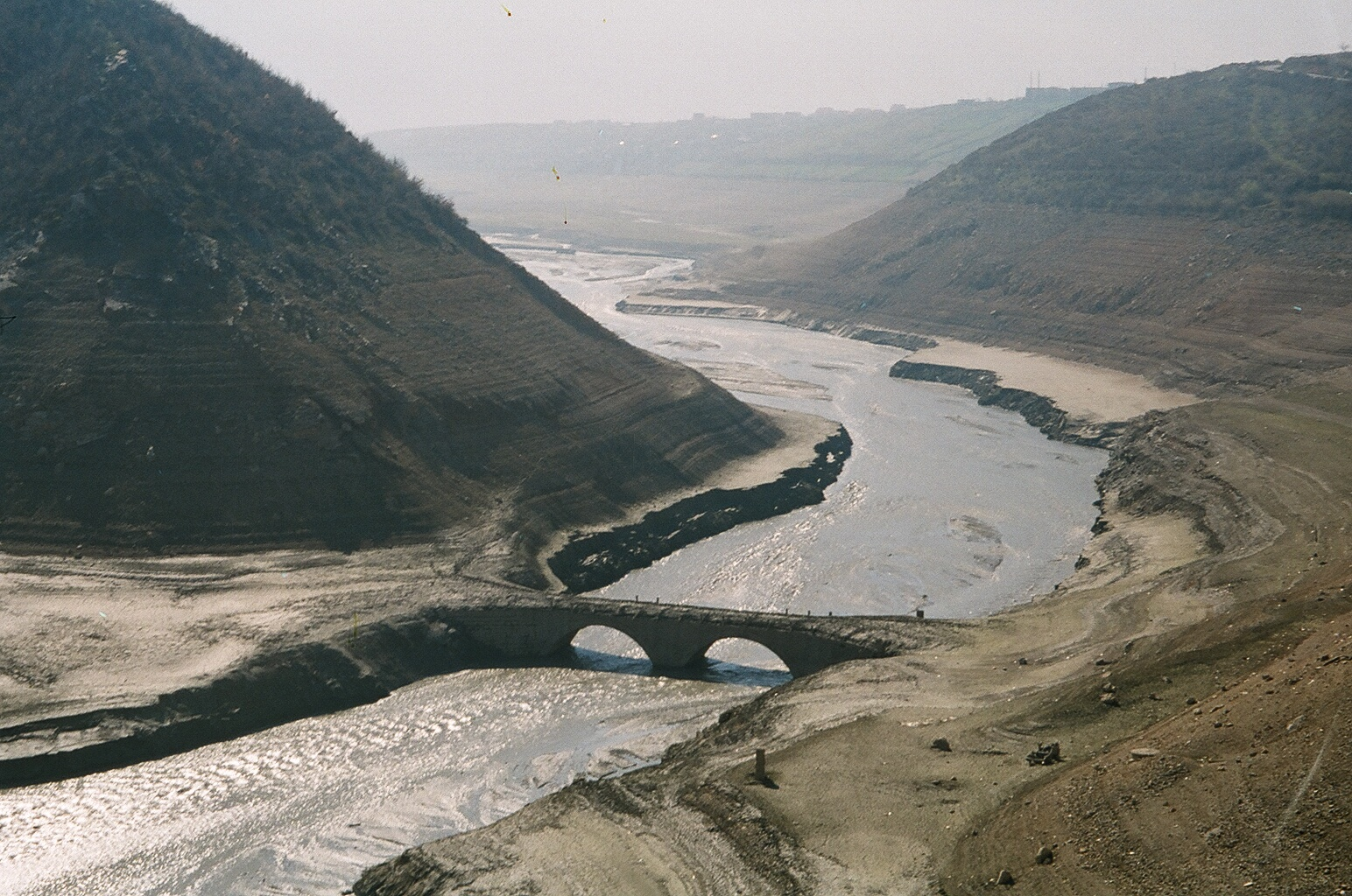 Kjo eshte Ura qe lidhte Kukesi e Vjeter me Prizerenin e ndertuar prane Kulles se Lumes ne rrugen e vjeter Kukes Prizeren para se te permbytej Kukesi nga Liqeni i Fierzes.